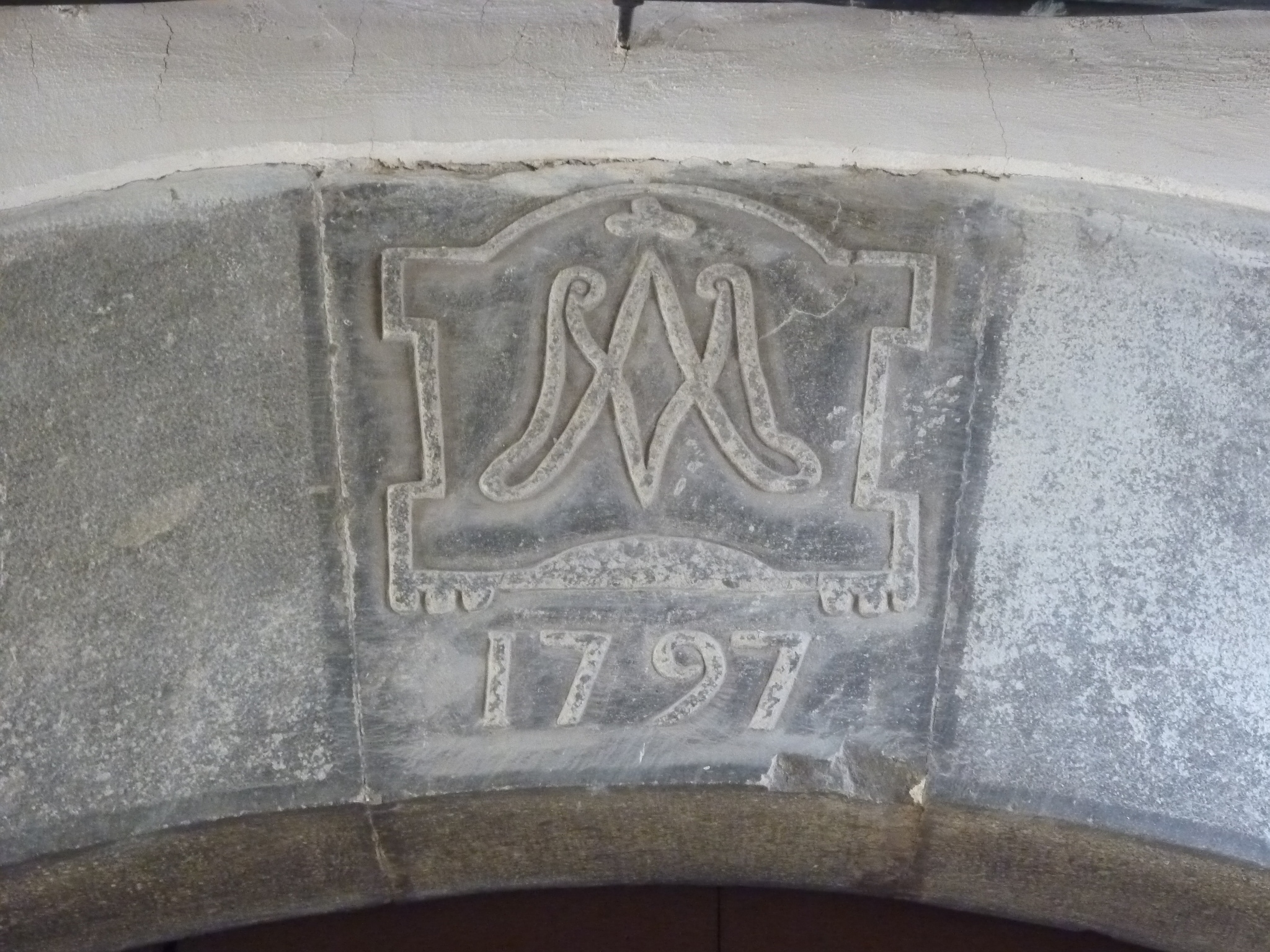 Museu del Patronat de la Vall de Lord (Sant Llorenç de Morunys): dintell de la porta